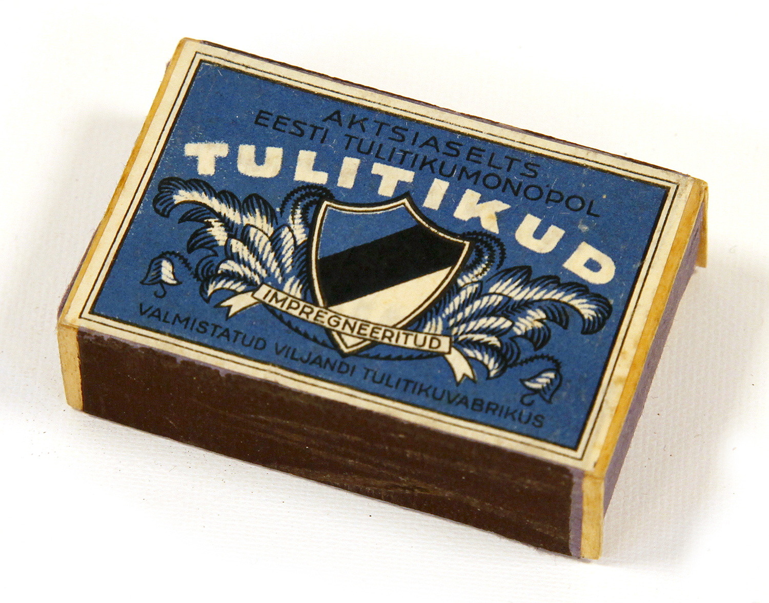 Tuletikutops, Viljandi Tuletikuvabrik, Tallinna Linnamuuseumist. Sini-must-valge